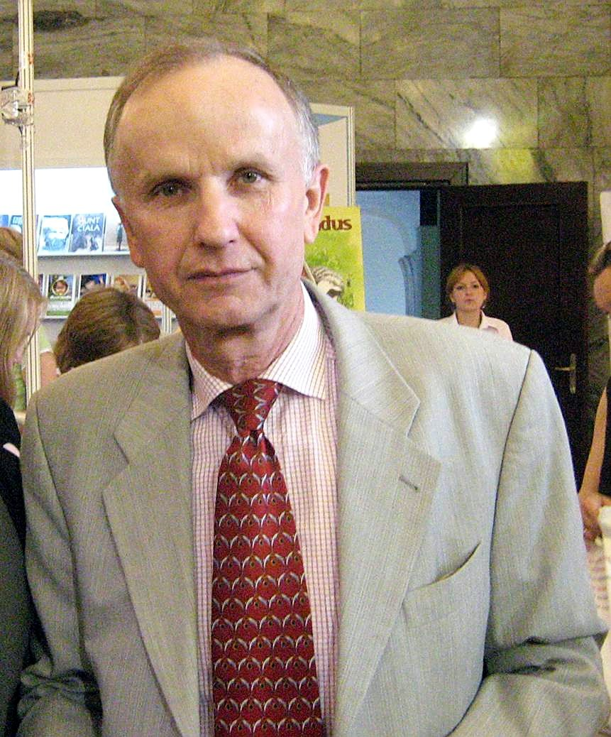 Grzegorz Witold Kołodko (ur. 28 stycznia 1949 w Tczewie) – polski polityk, profesor zwyczajny, doktor habilitowany nauk ekonomicznych